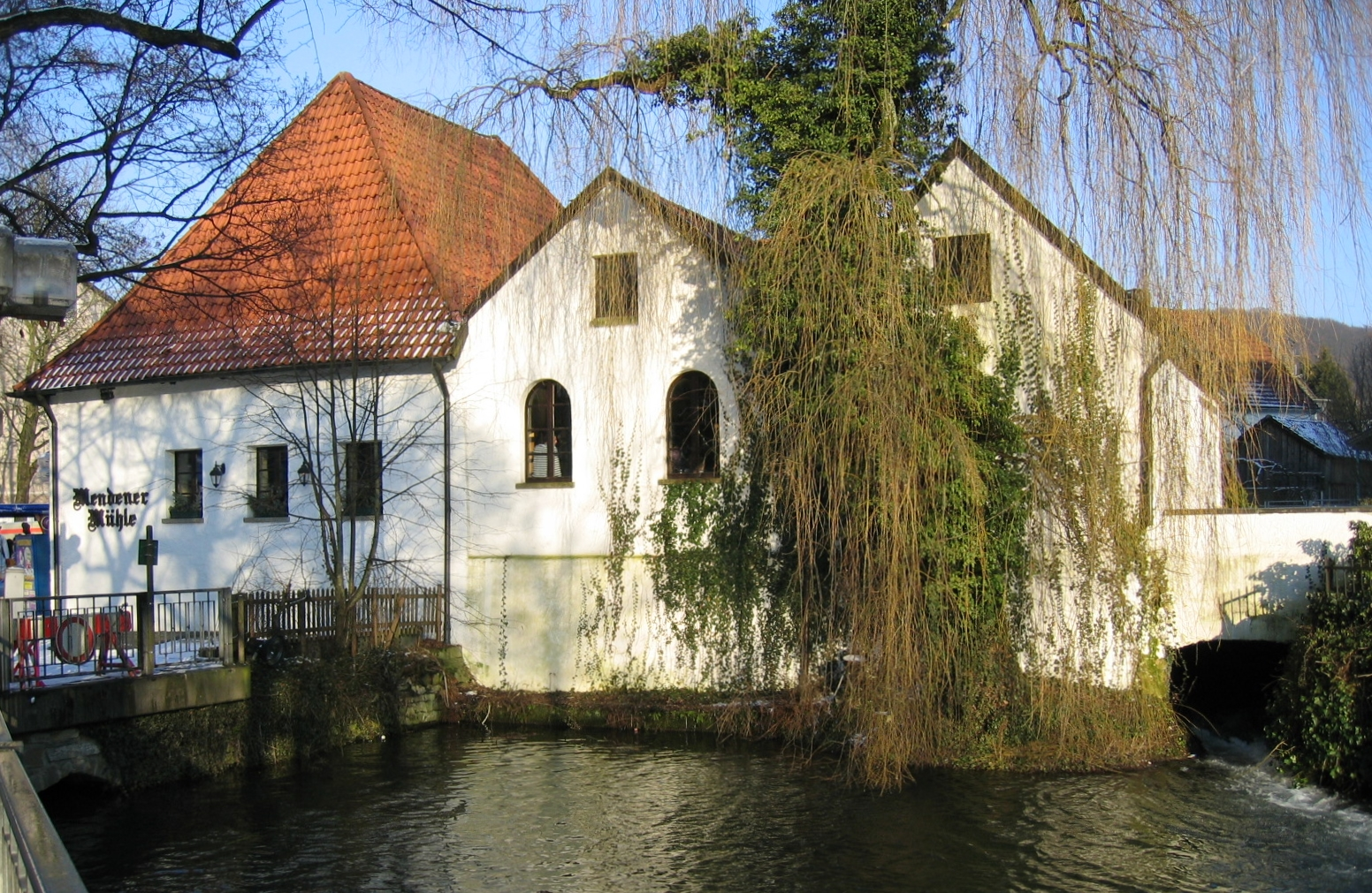 Description: Schlossmühle mit Mühlenteich in Menden (Sauerland). Sie war die älteste Mühle in Menden. Vermutlich im 14. Jahrhundert errichtet. Source: selbst fotografiert Date: 26. Feb. 2006 Author: Asio otus